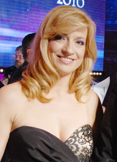 Jarmila Lajčáková-Hargašová